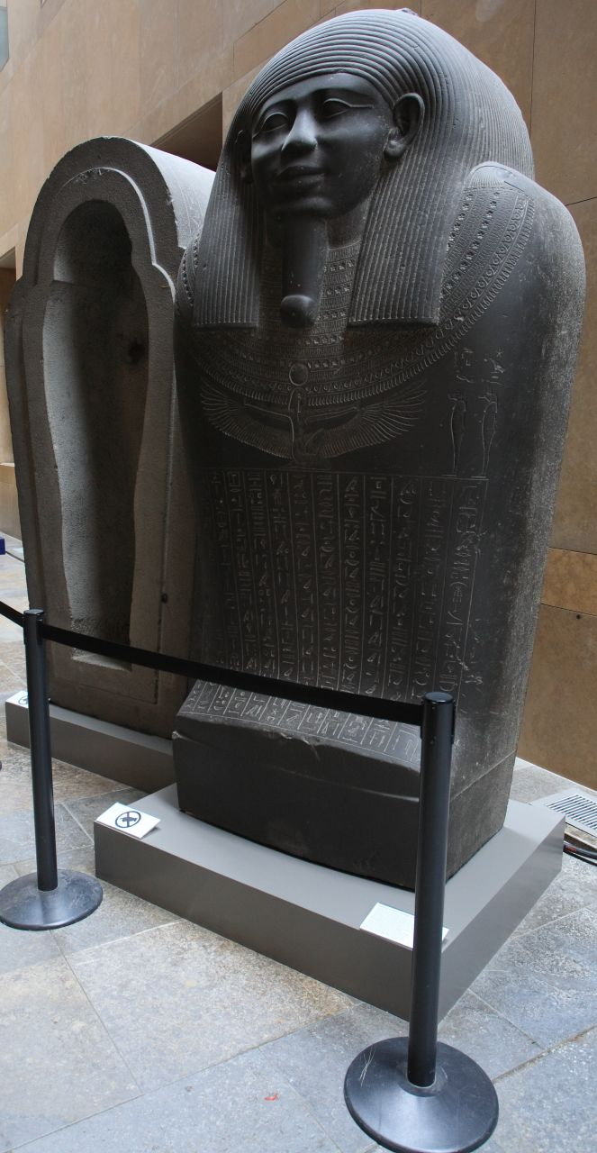 Venster 2 (De wapens van Jan van Valkenburg en zijn echtgenoot Johanna van Voorne, vrouwe van Bergen op Zoom.)Sarcofaag van Ahmes In het kader van Wiki Loves Art NL.